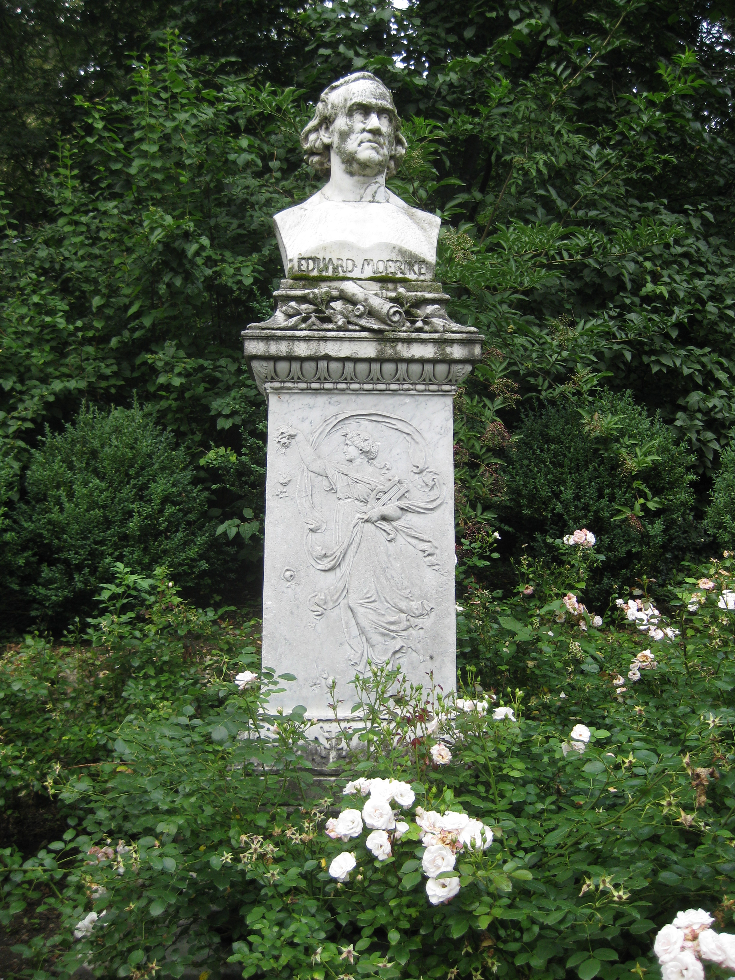 Wilhelm Rösch: Mörike-Denkmal, Postament nach dem Entwurf des Architekten Recke, Marmorbüste Eduard Mörikes und Postamentrelief von Wilhelm Rösch, Entstehungsjahr 1879-1880, Stuttgart, Silberburganlage, gegenüber Silberburgstraße 193. Das Relief zeigt Euterpe, die Muse der Dichtkunst, die mit einer Hand Blumen streut und in der anderen die Kithara hält.